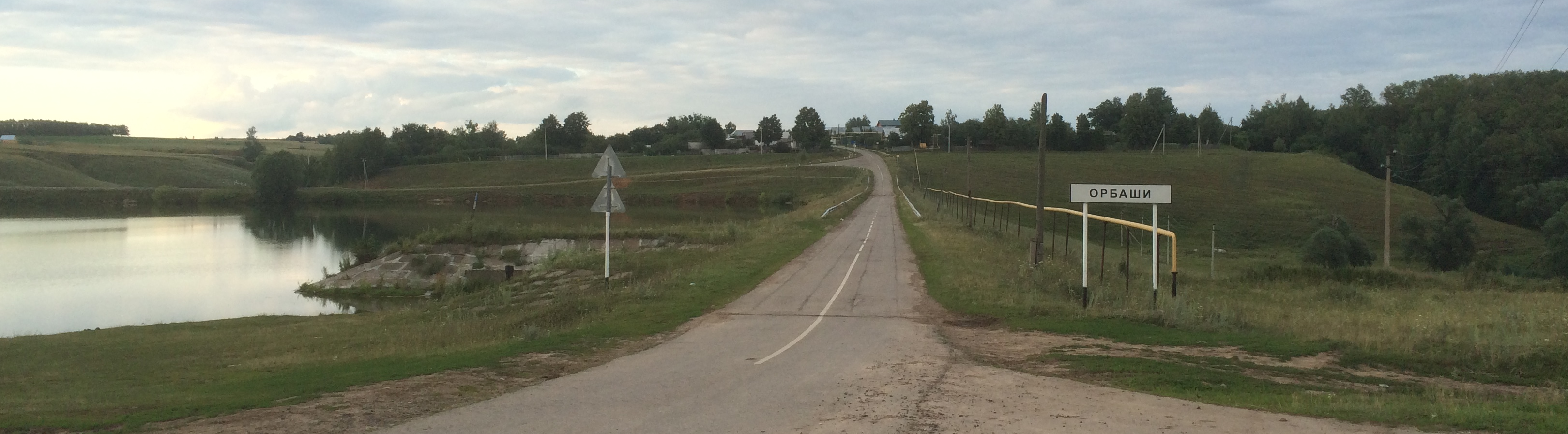 Чӑвашла: Урпаш ялне кӗрсен, трасӑран килсен. Сулахайалла - Хӗрлӗту